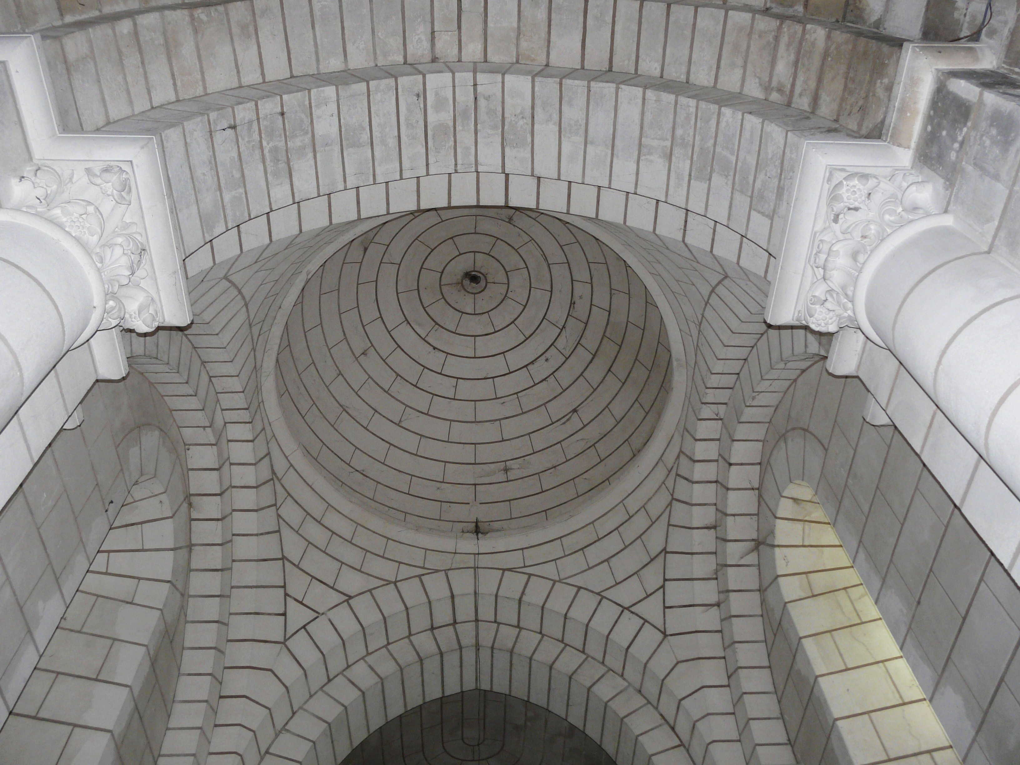 La coupole de l'église Saint-Barthélemy, Creyssac, Dordogne, France.